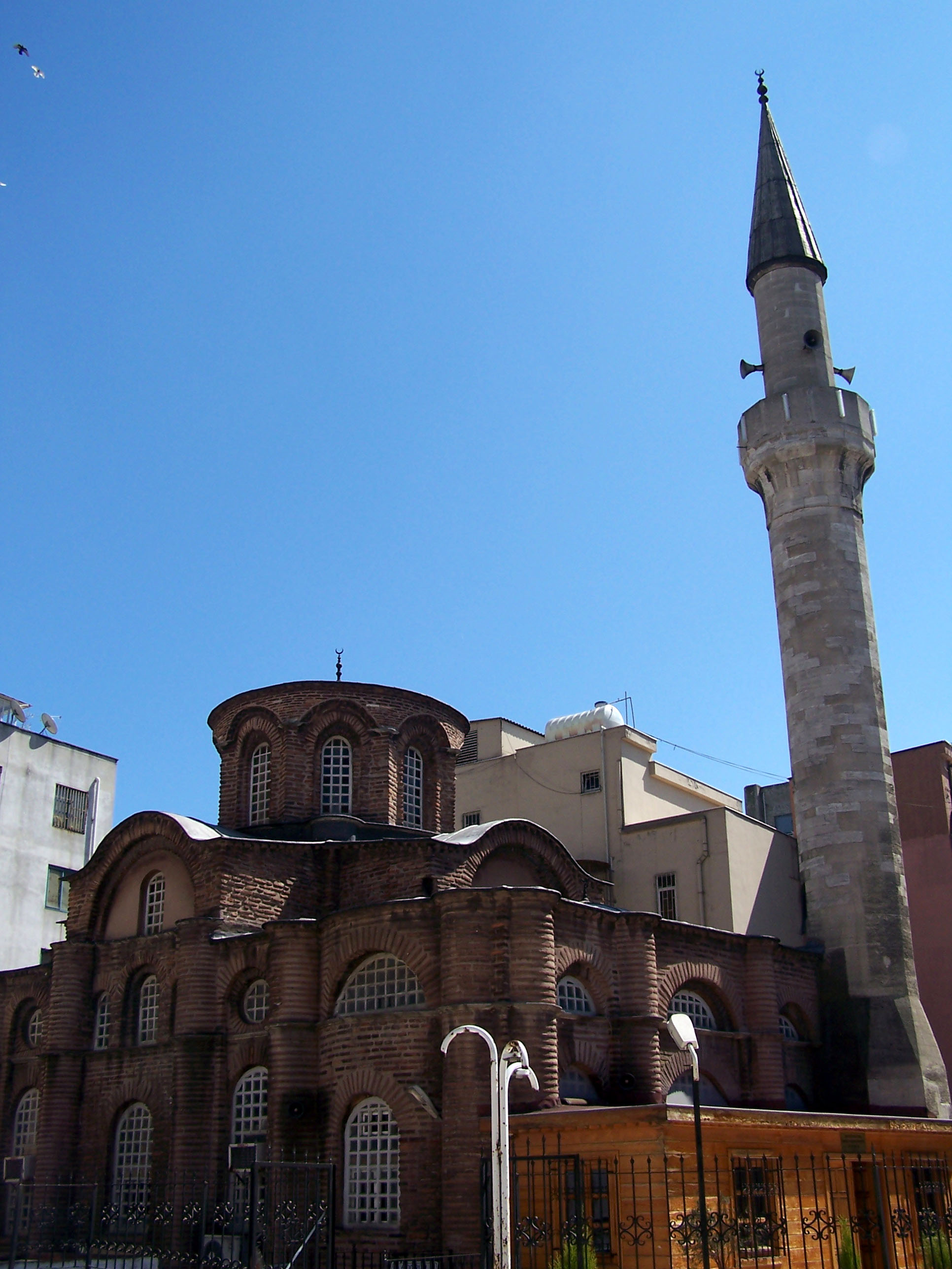 Bodrum Mesihpaşa Camii in Laleli.